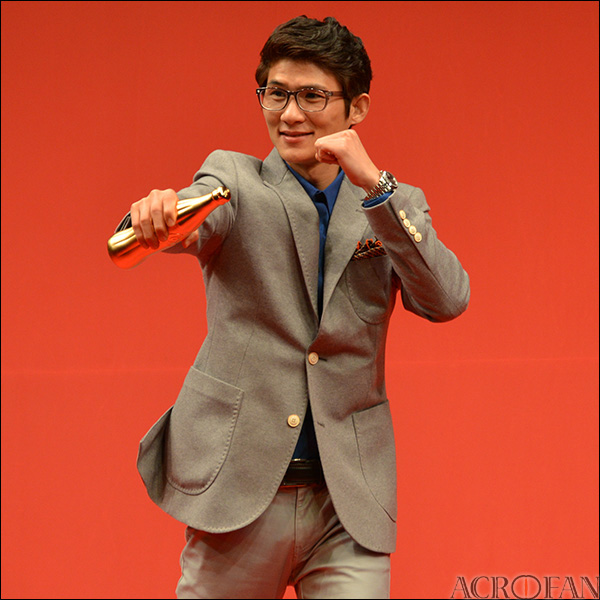 코카-콜라 체육대상 20주년 기념 트로피 증정식